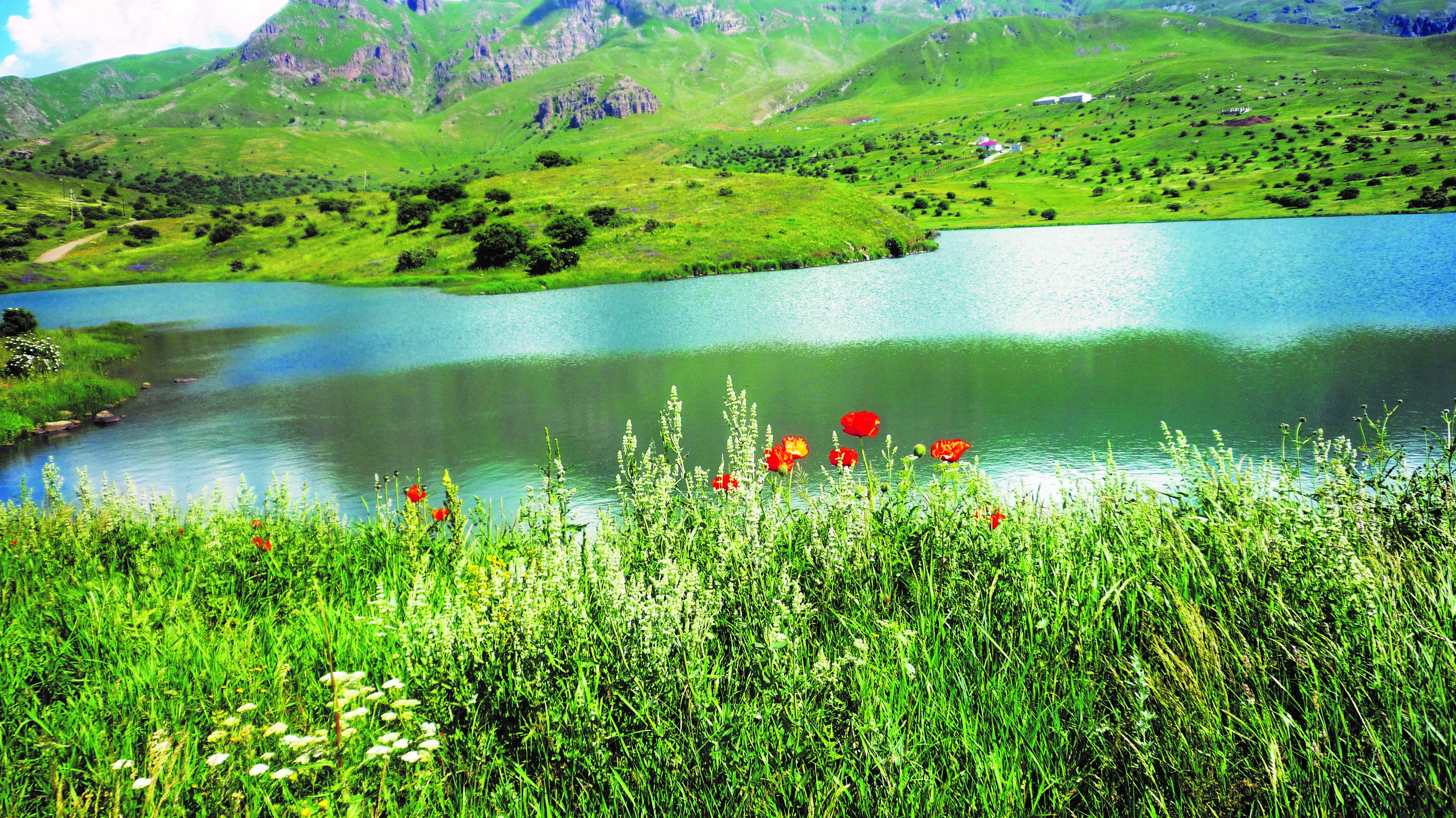 Orta Araz təbii vilayətində bozqır və seyrək kolluqlar